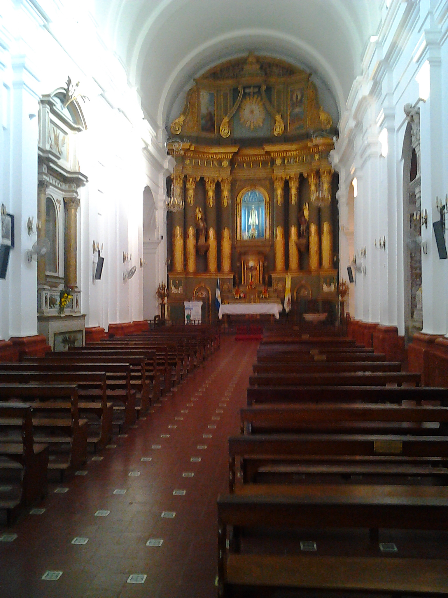 Interior de la Parroquia Nuestra Señora del Pilar. Pilar, Provincia de Buenos Aires. Autor: Marcos G-O